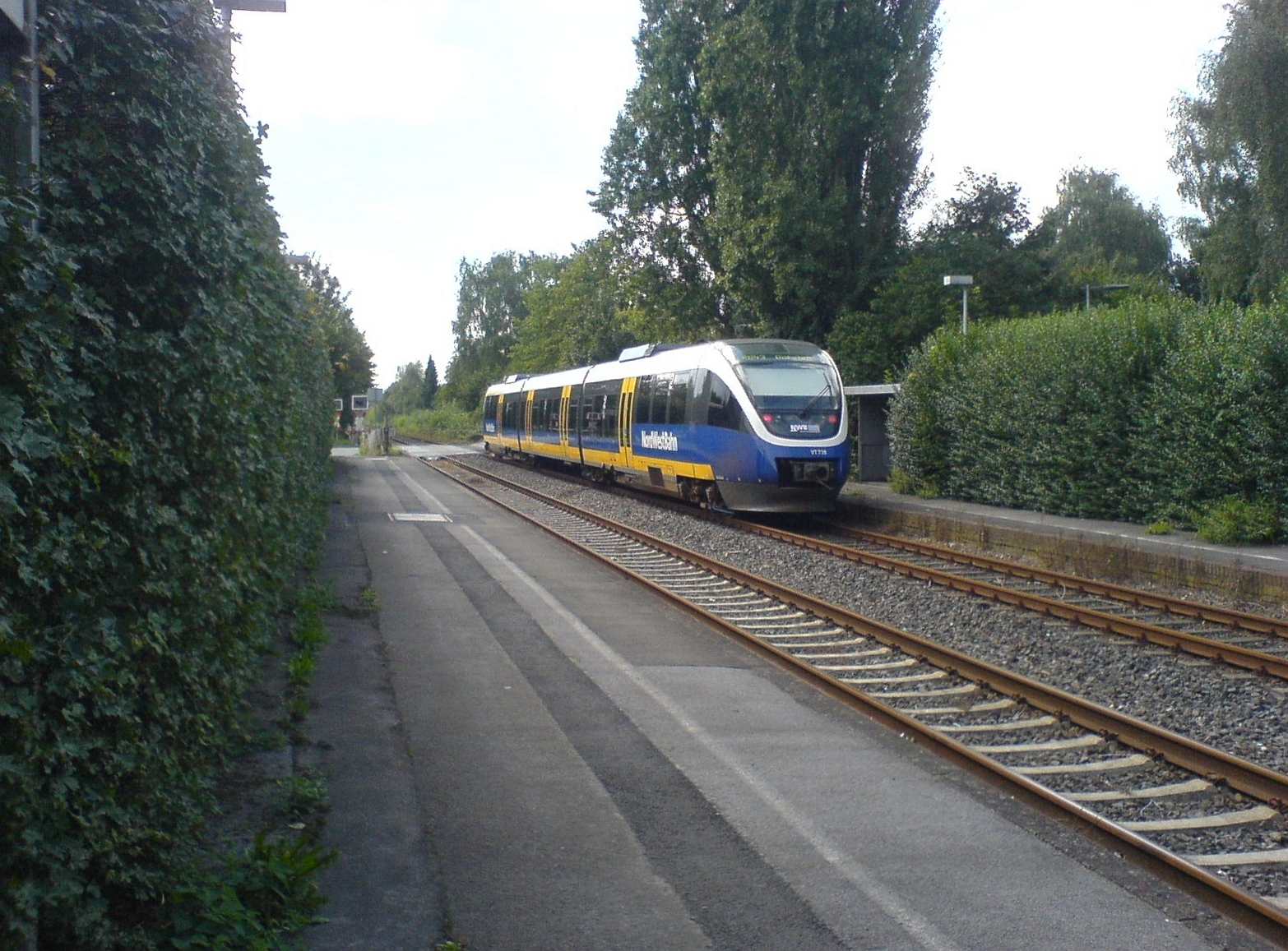 Bahnhof Dortmund-Rahm